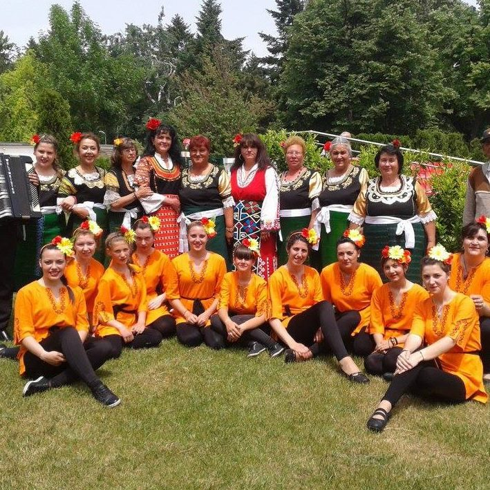 Самодейните групи към НЧ "Просвета 1929